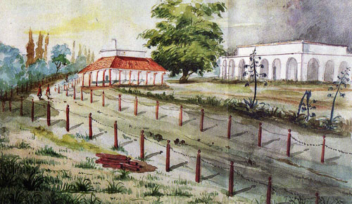 Hacienda de Palermo, en donde se alojó Juan Manuel de Rosas